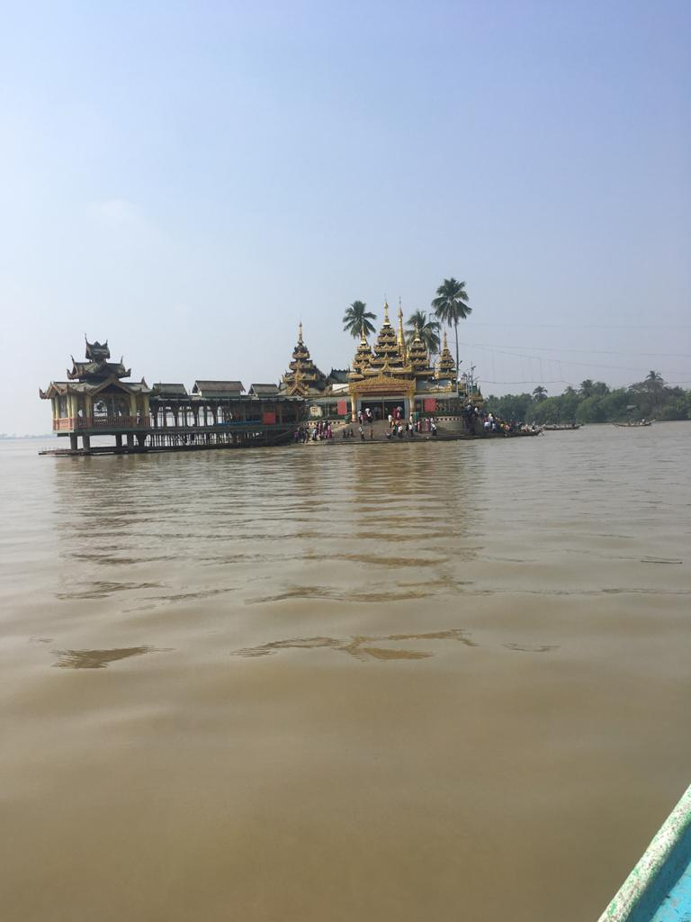 हे एक तळ्यातील अतिशय सुंदर देऊळ आहे.